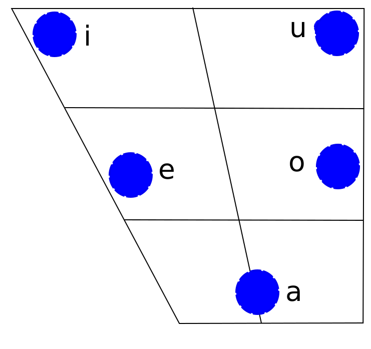 Realizacja wymowy samoglosek w esperanto